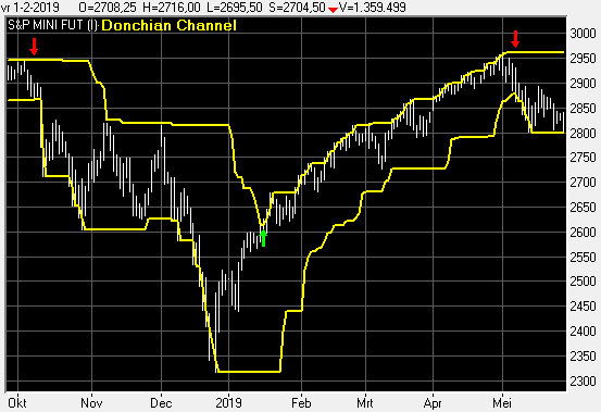 Donchian channel toegepast op de S&P mini future dagkoersen